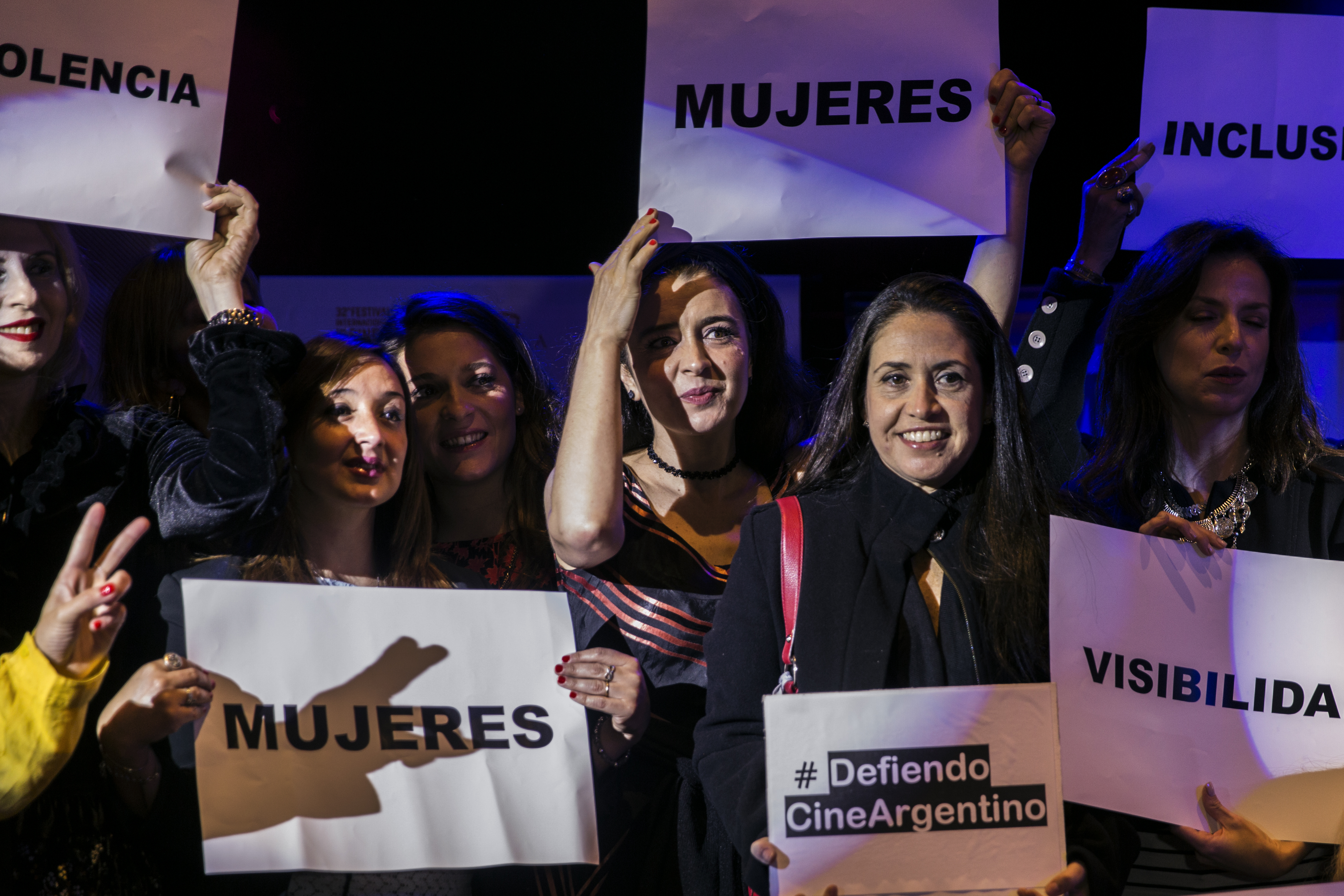 Mar del Plata, 19 de Noviembre de 2017.- La Asociación La Mujer y el Cine que apoya, difunde y promociona el cine realizado por mujeres de la Argentina, celebra sus 30 años con un homenaje a Lita Stantic.